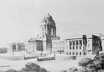 Japanese Diet Hall design by Fukuzo Watanabe